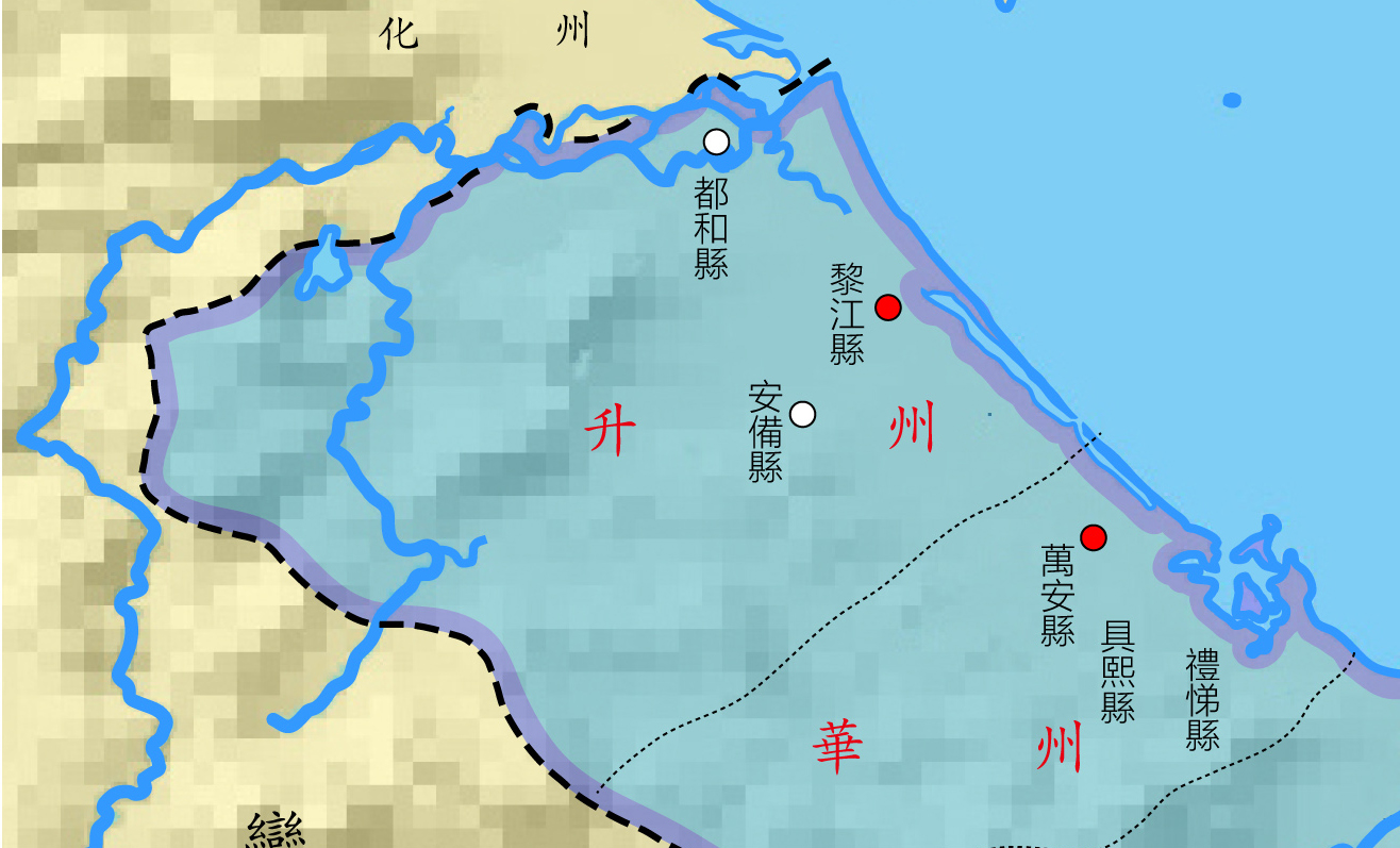 升州。